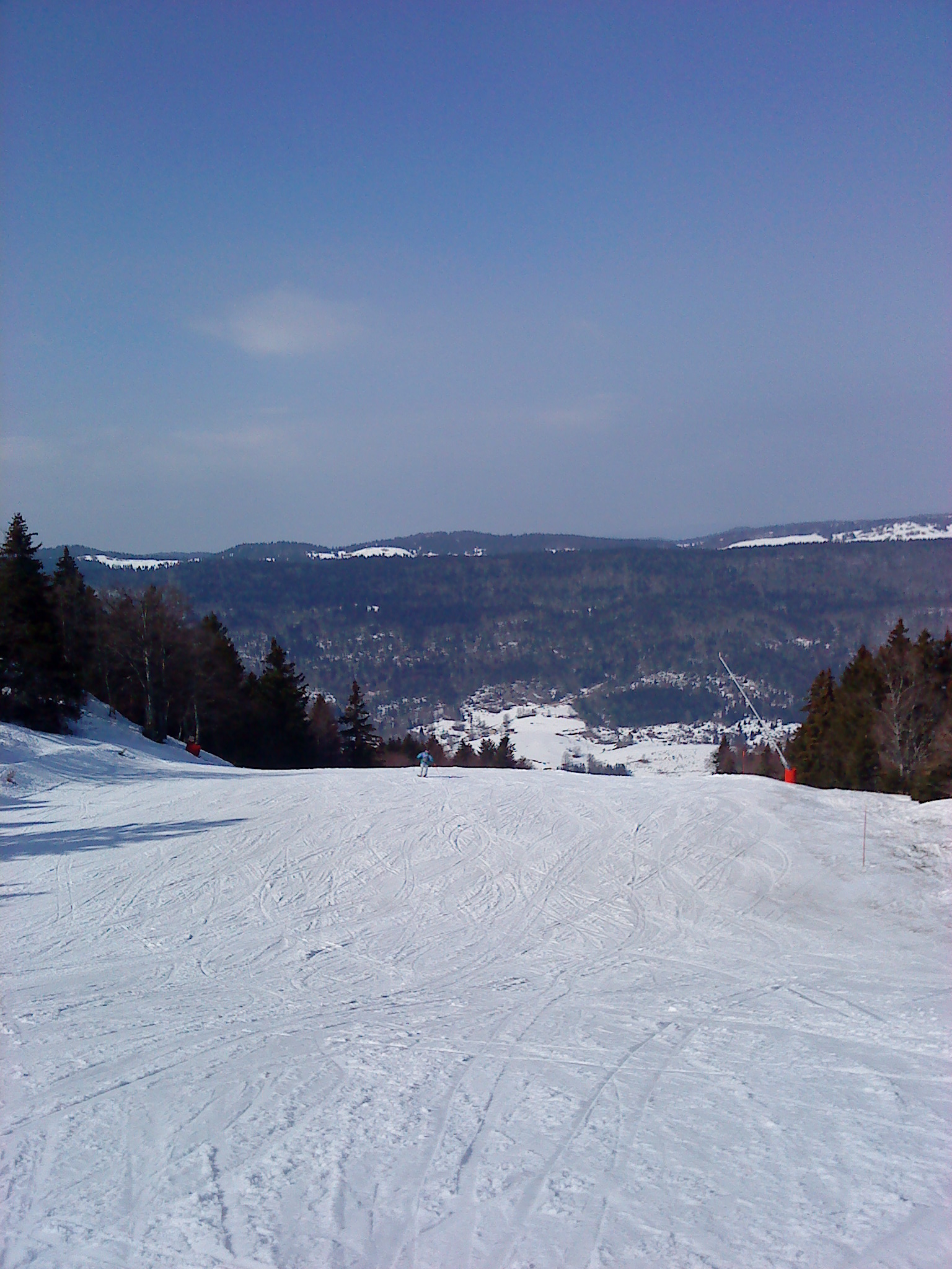 Piste de ski alpin Les Œillets à Lélex, Ain, France.